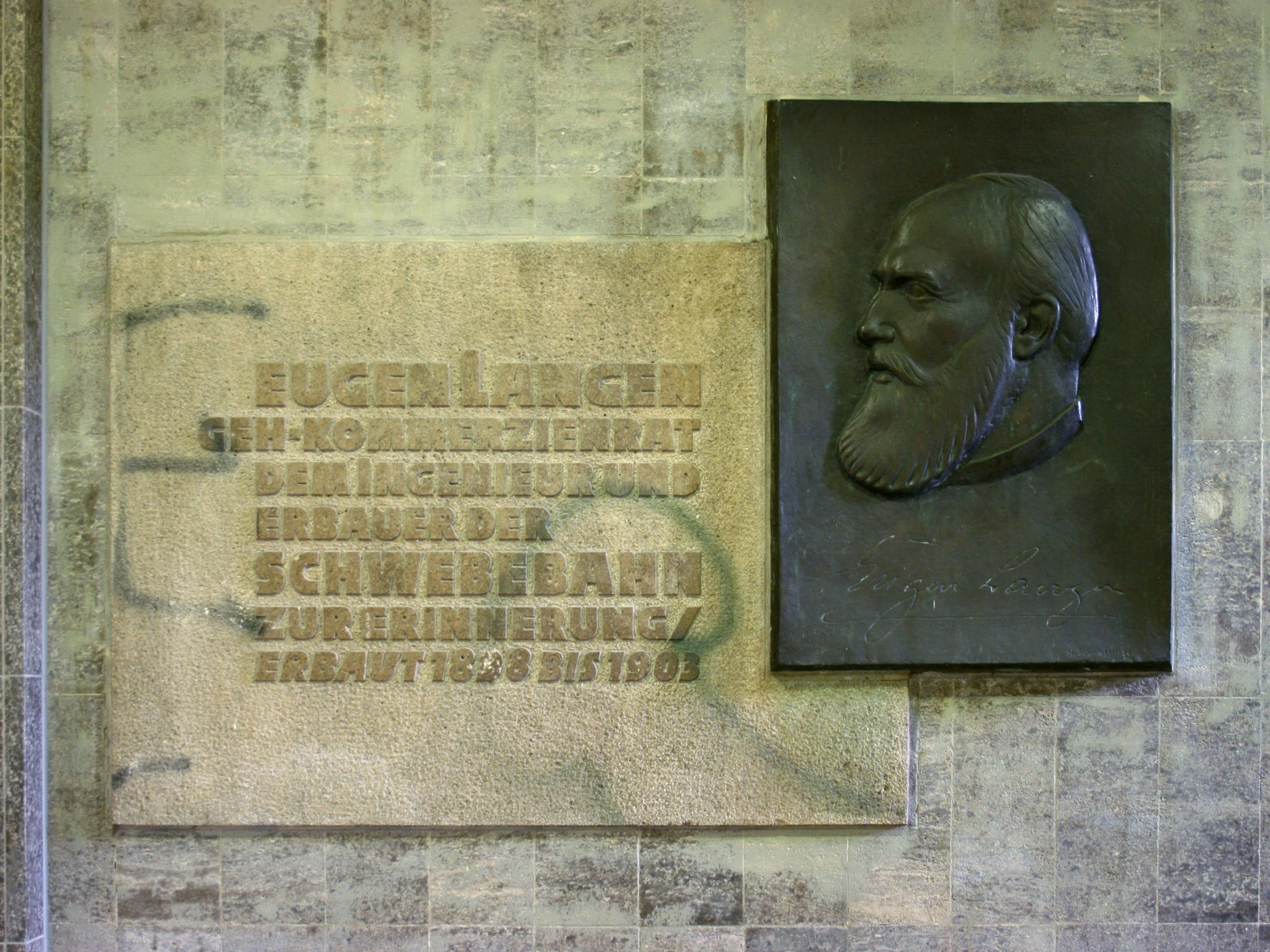 Schwebebahnstation Wuppertal Hbf in Wuppertal